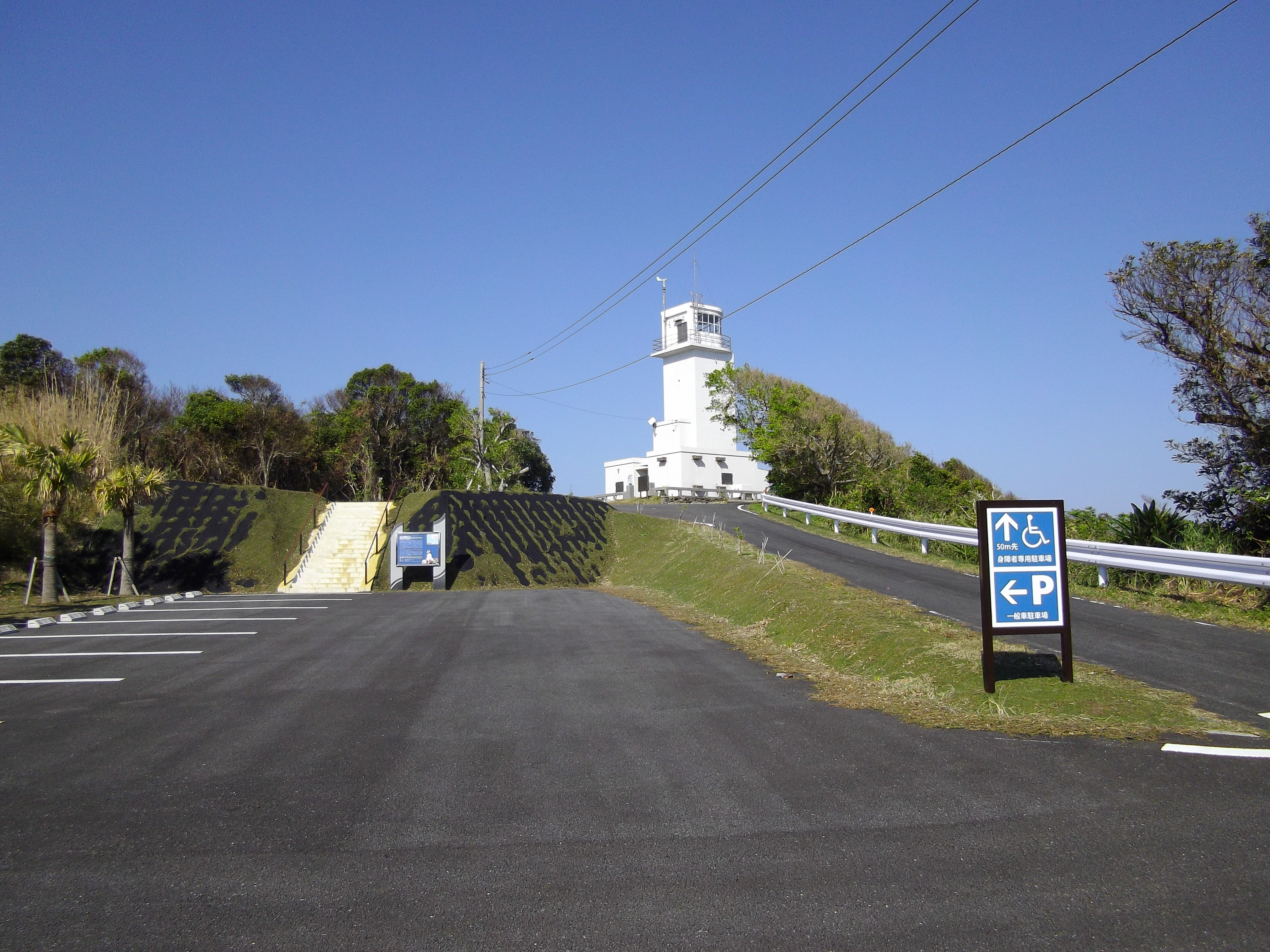 希志碕燈台